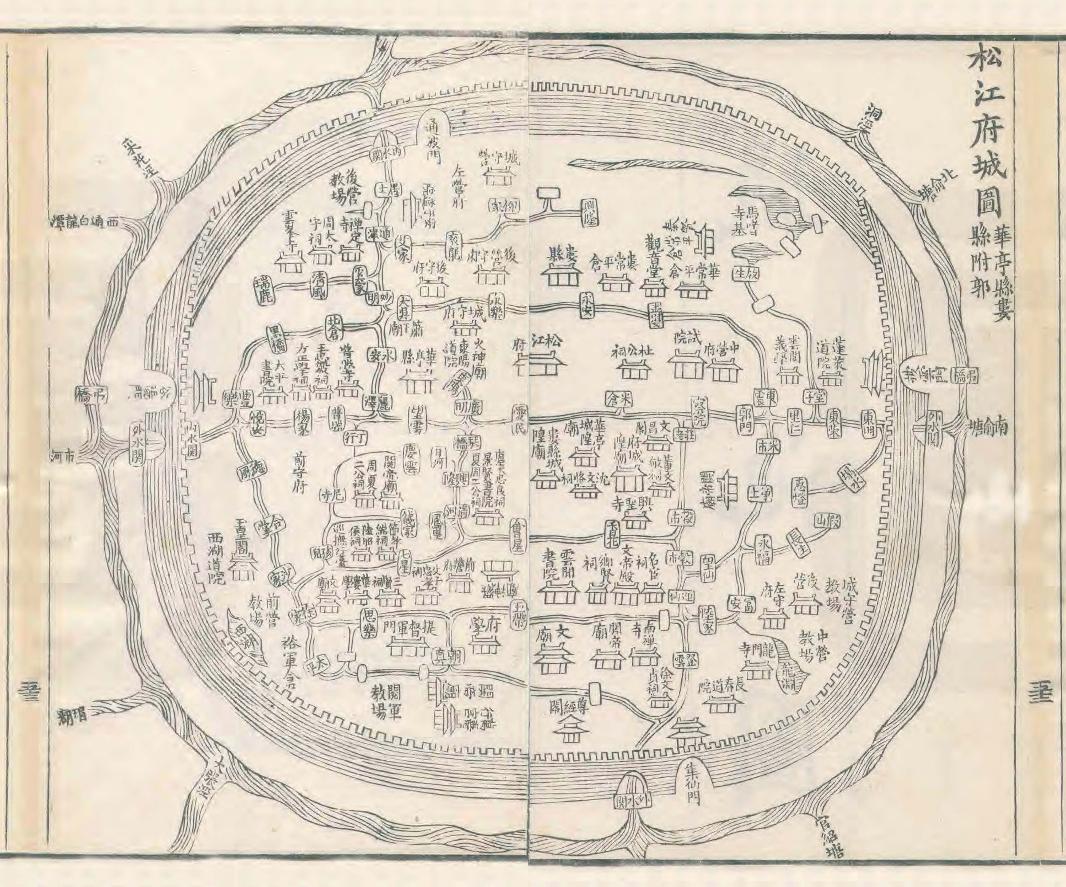 清嘉庆二十三年（1818）《松江府志》松江府城图。